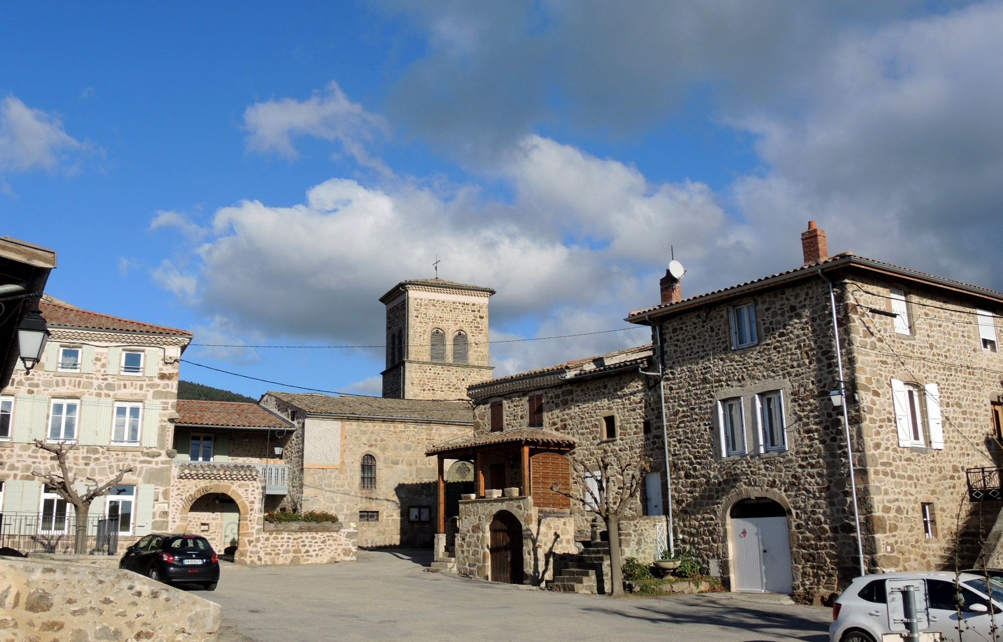 Saint-Clair (Ardèche) place